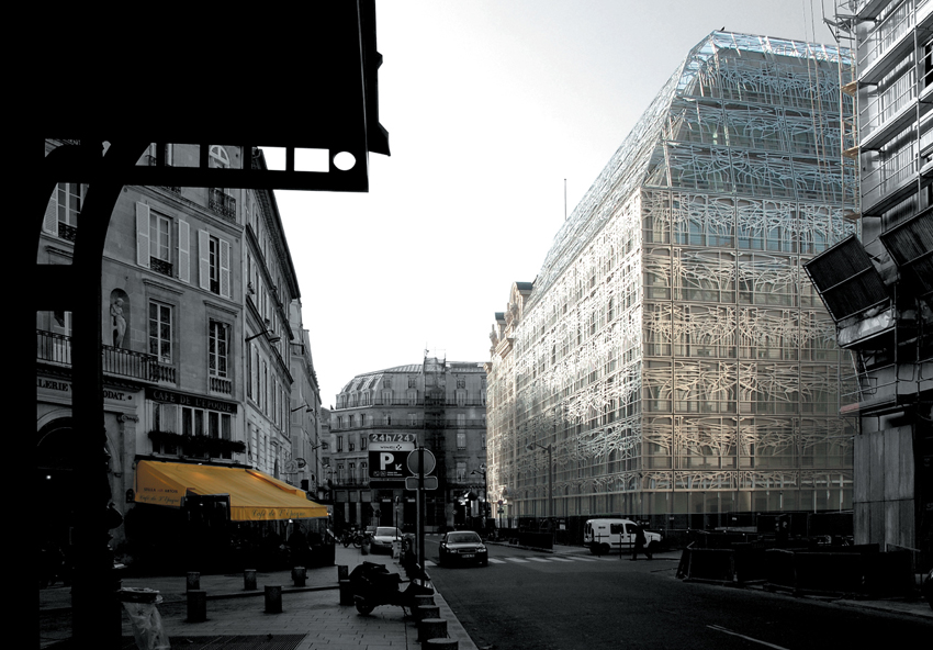 MINISTERE DE LA CULTURE ET DE LA COMMUNICATION (2005)